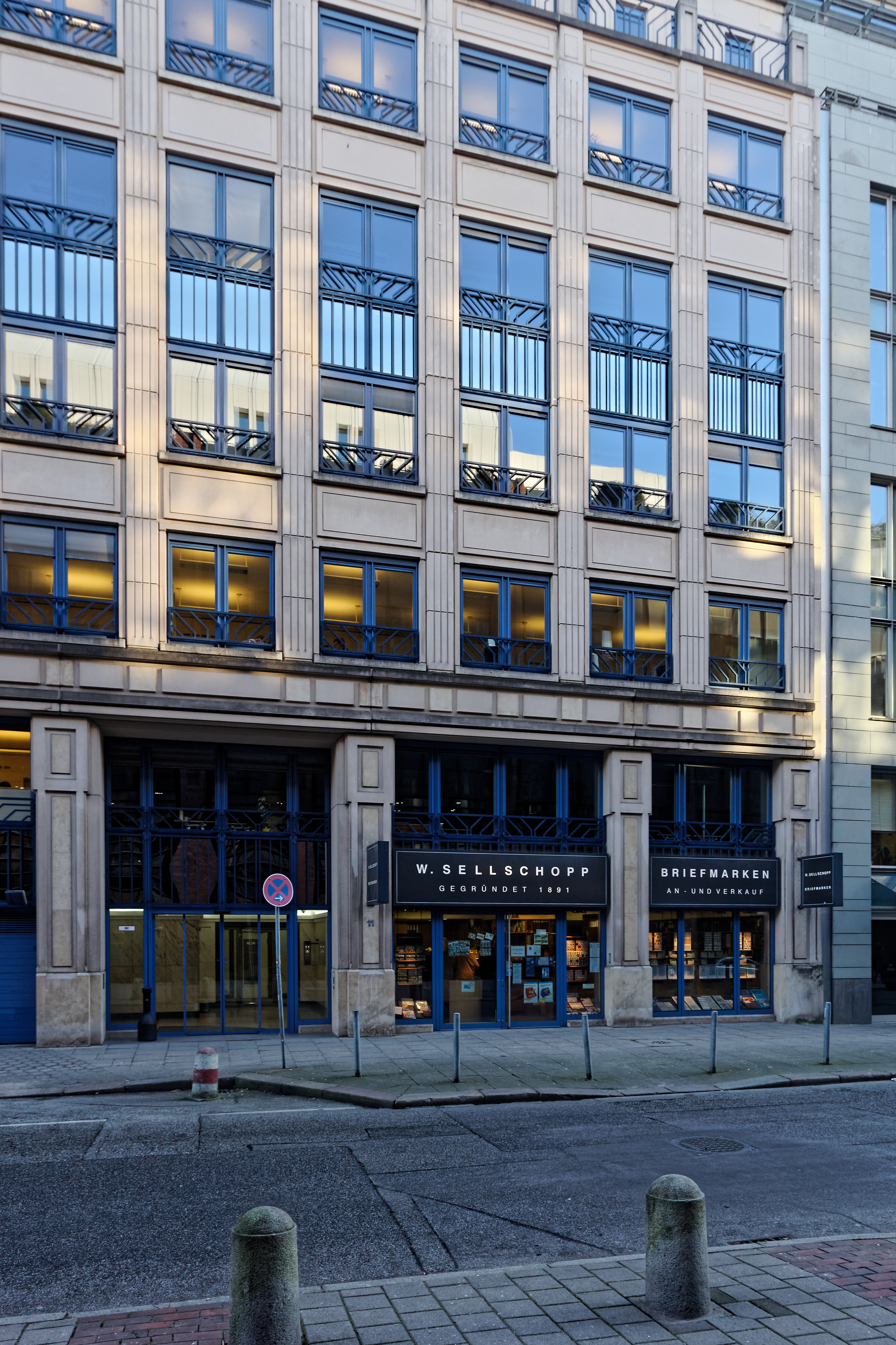 Hamburg-Altstadt, Gebäude Rosenstraße 11